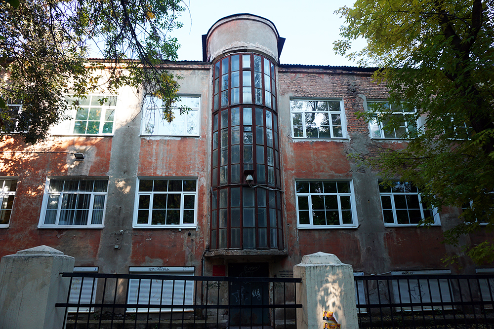 Бывшие ясли домов Госпромурала (Гостяжпромурала). Фото К. Д. Бугрова, 2016 год.